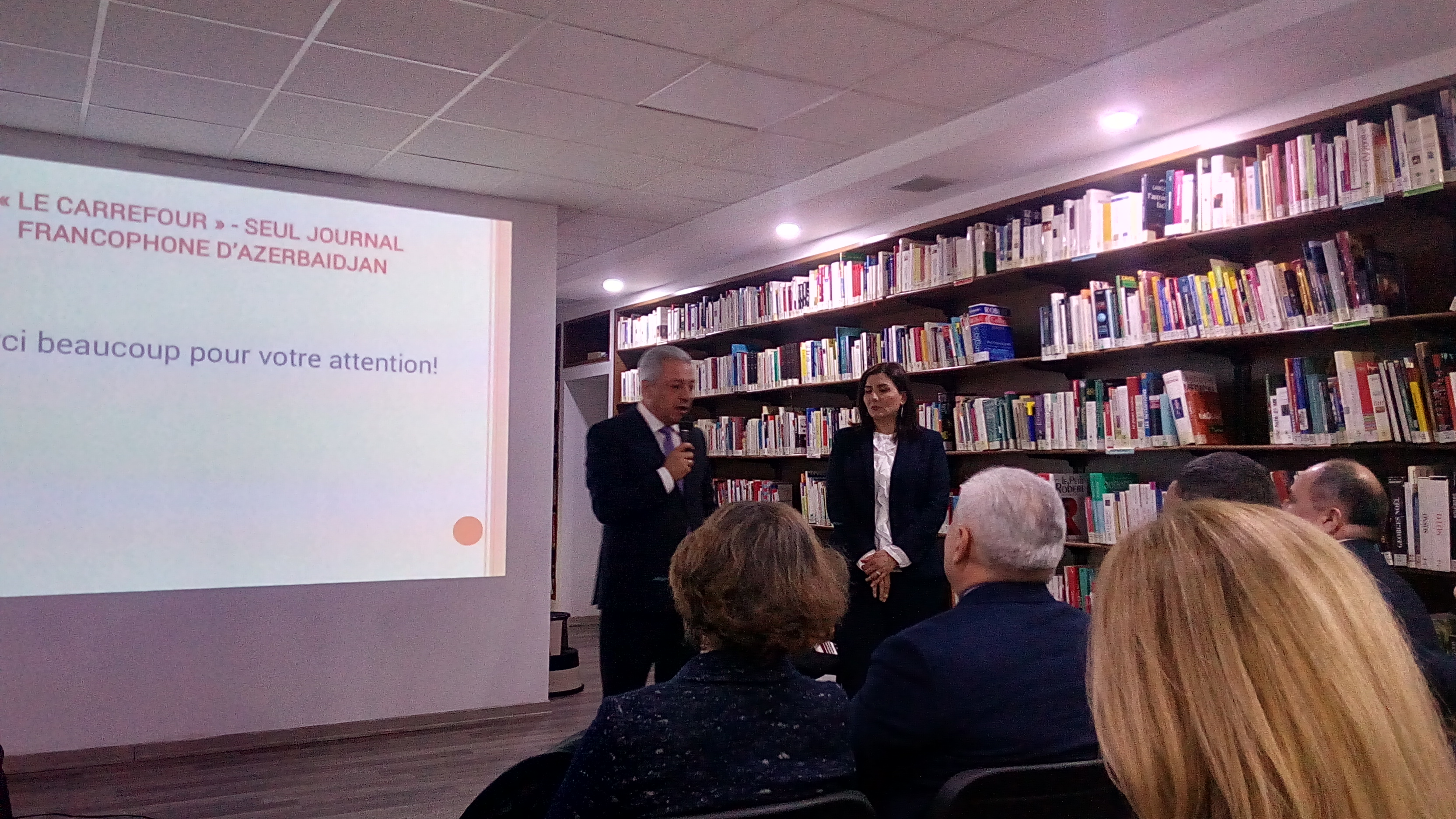 Azərbaycandakı Fransız İnstitutunda Le Carrefour qəzetinin təqdimatı